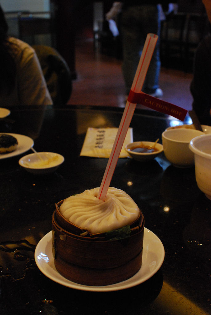 Tang bao Tong bao